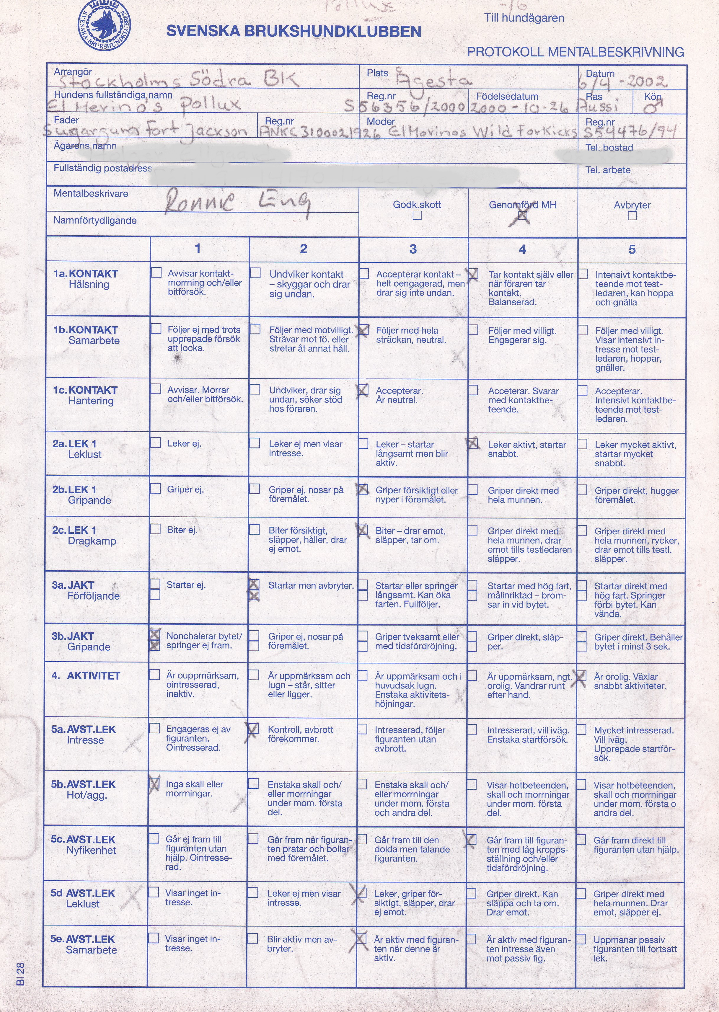 Protokoll: Mentalbeskrivning Hund 2002, sida 1 (här för en Australien shepherd)